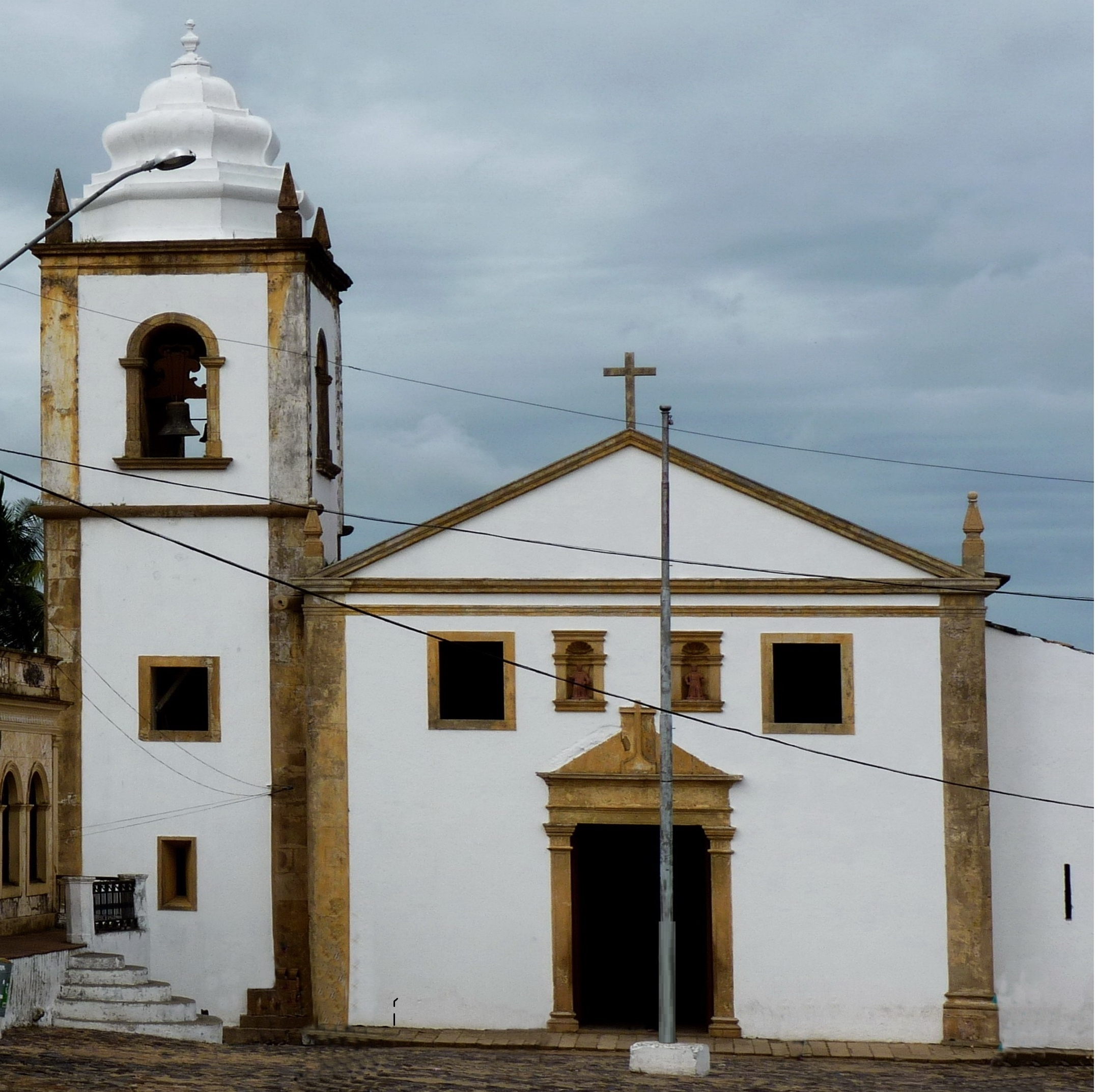 Igarassù - Igreia de Sao Cosme e Damiao - anno1535